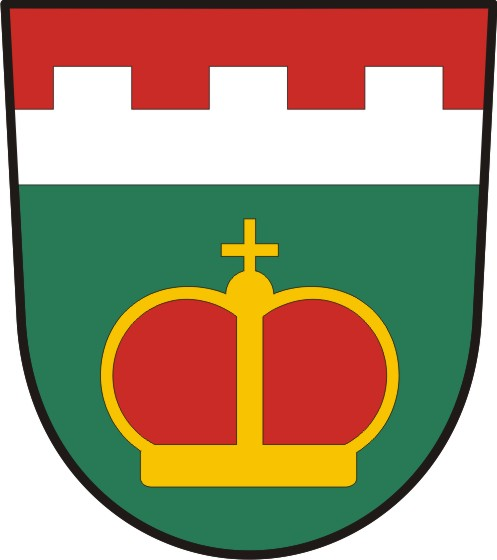 Račice